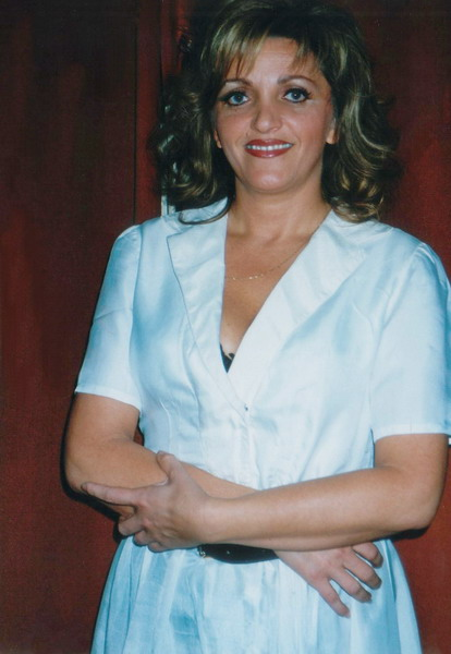 Sümegi Eszter opera-énekesnő